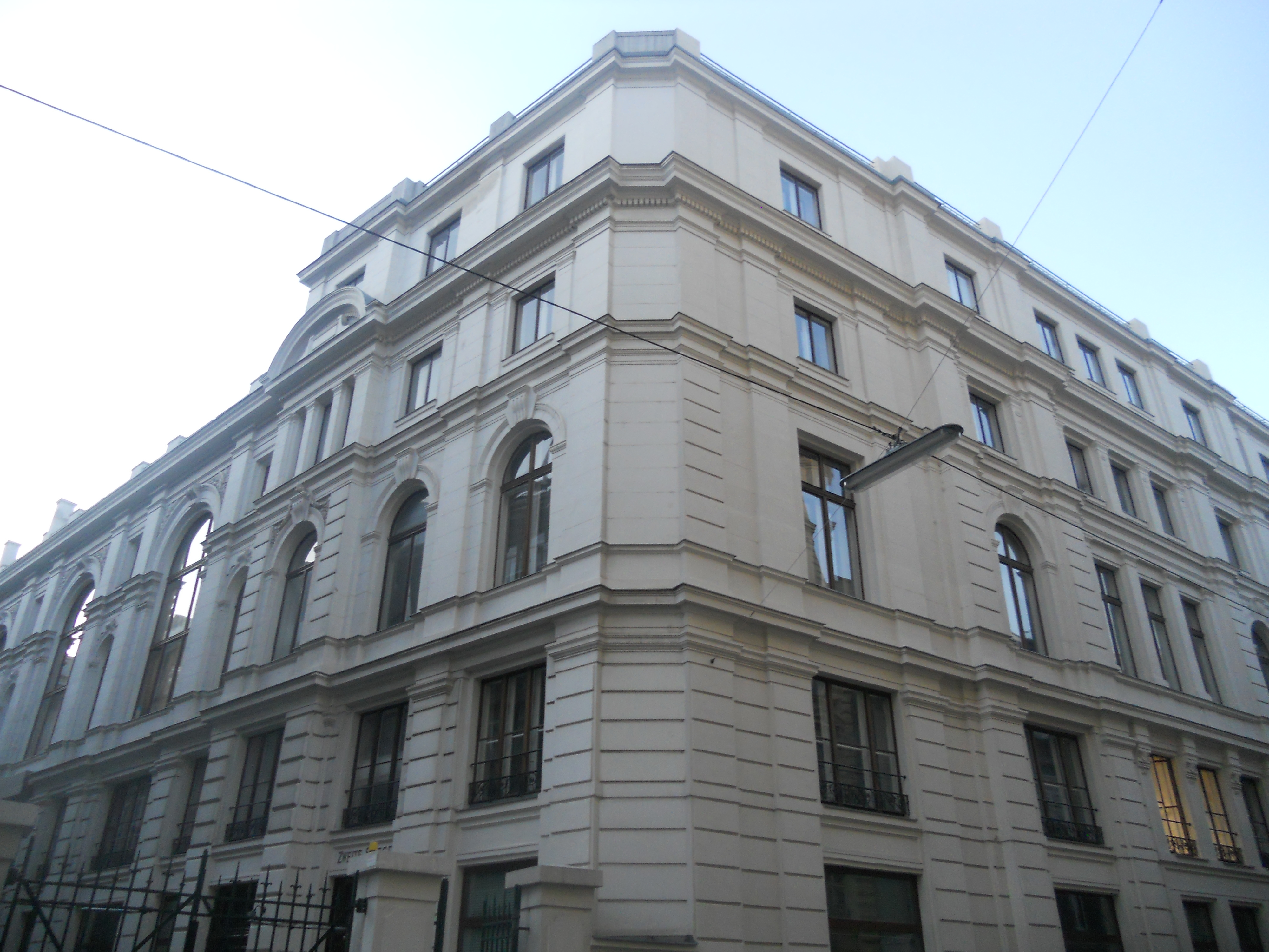 Die ehemalige Börse für landwirtschaftliche Produkte in der Taborstraße in Wien, Hinterseite Große Mohrengasse